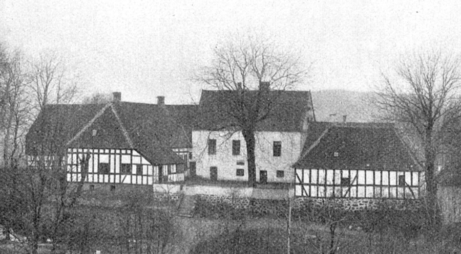 Østrupgaard er en gammel gård, som nævnes første gang på Erik af Pommerns tid, i 1425 . Gården ligger i Håstrup Sogn, Sallinge Herred, Faaborg Kommune. Hovedbygningen er opført i 1500 og ombygget i 1572-1638-1710-1784, Østfløjen genopført i 1940-1942 efter en brand i 1937.